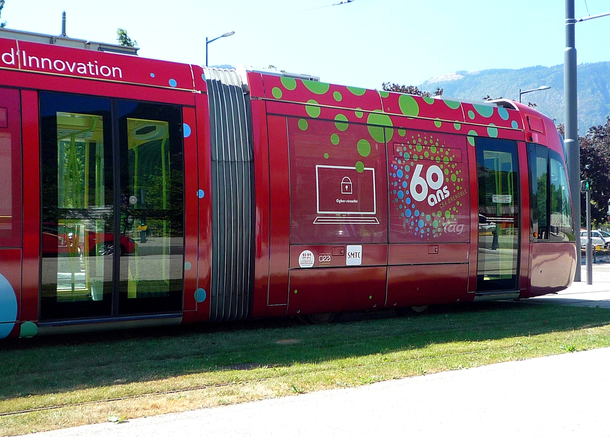 Tramway de Grenoble décoré en septembre 2016 à l'occasion du 60e anniversaire du CEA Grenoble.